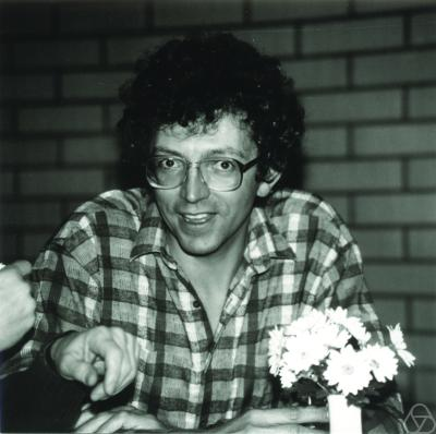 David Avis